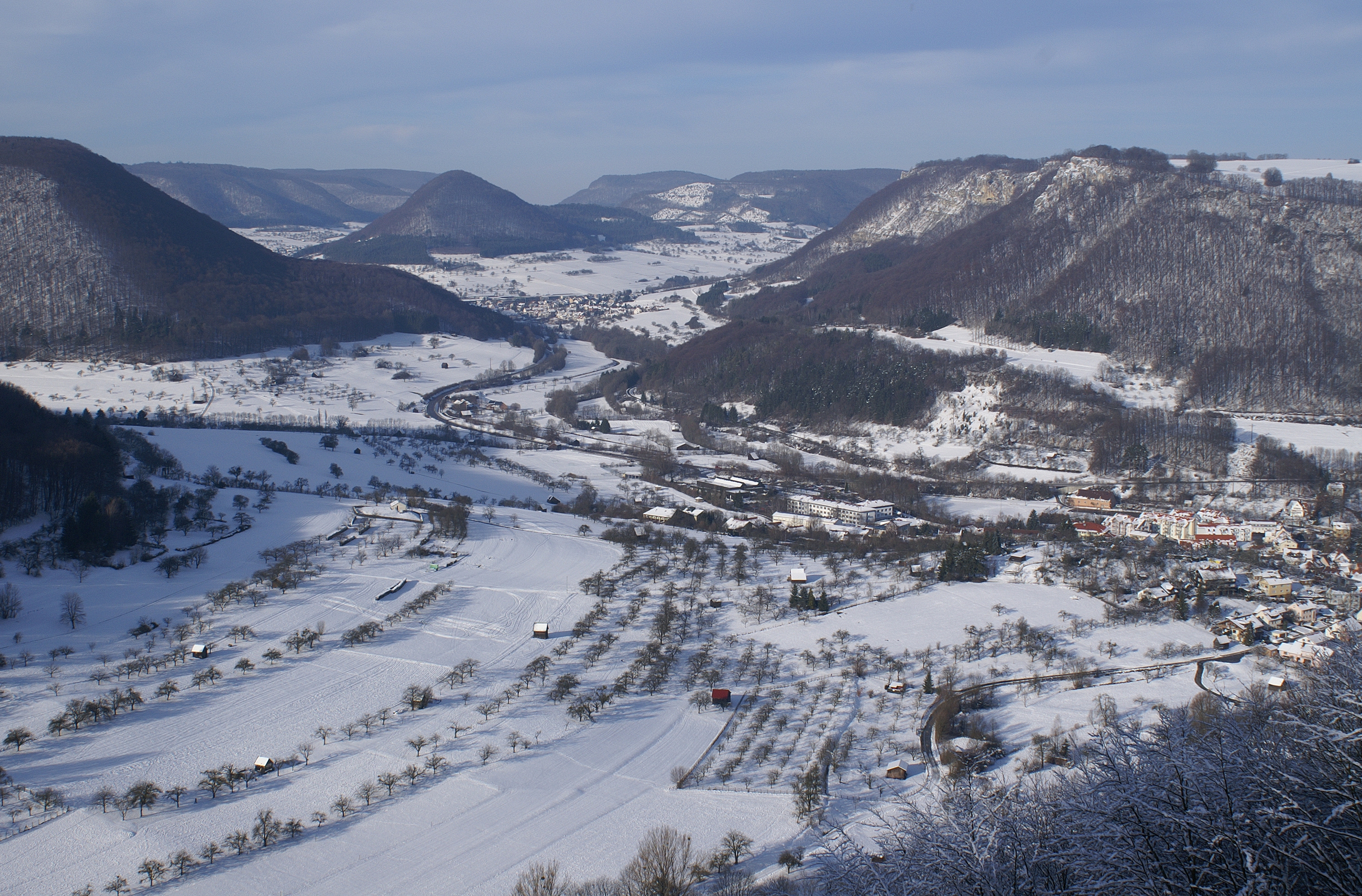 Das Obere Filstal bei Bad Überkingen und Hausen an der Fils